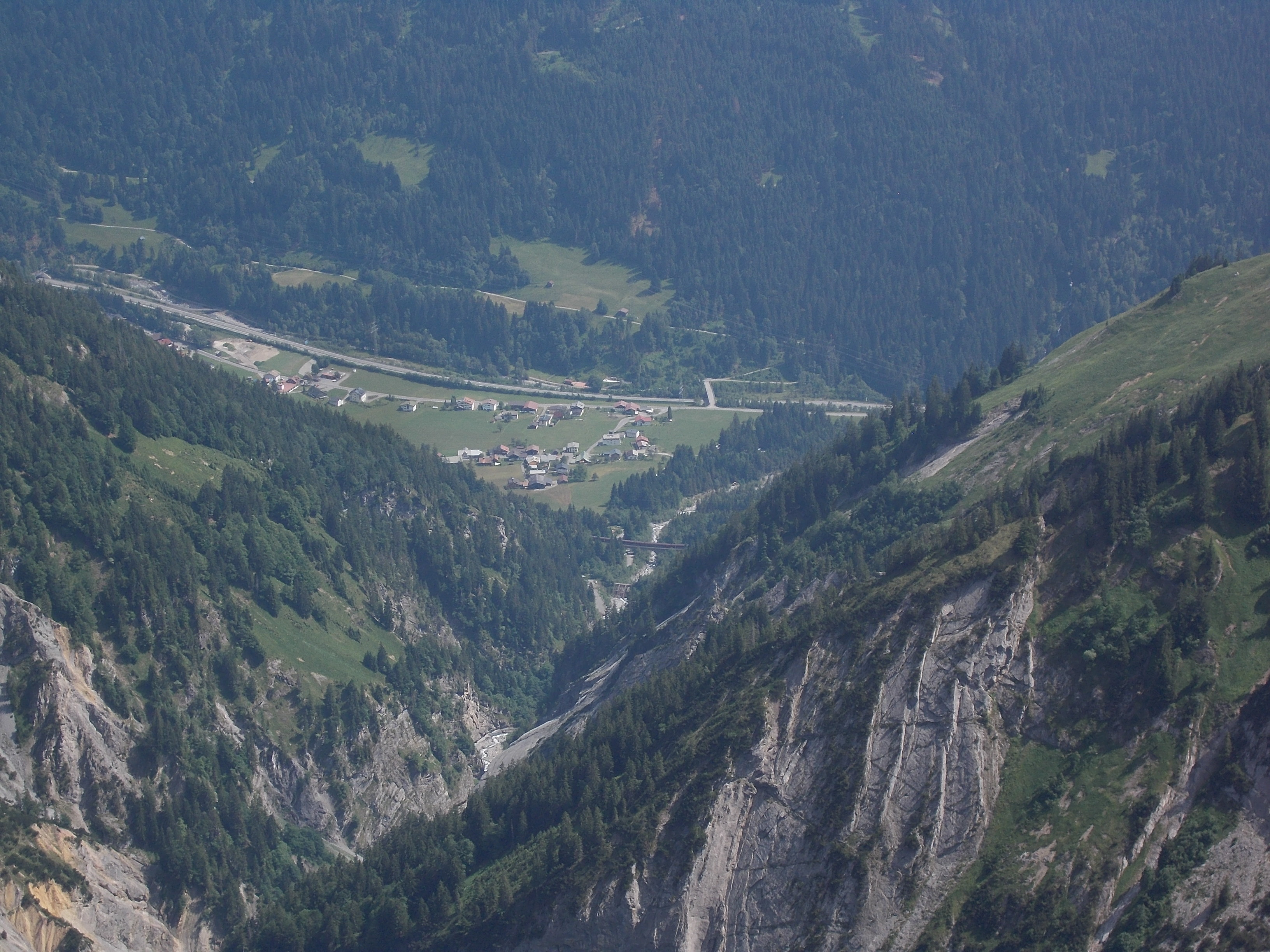 Blick aus 2300 m in das Radonatobel, eines der berüchtigtesten Tobel im Klostertal